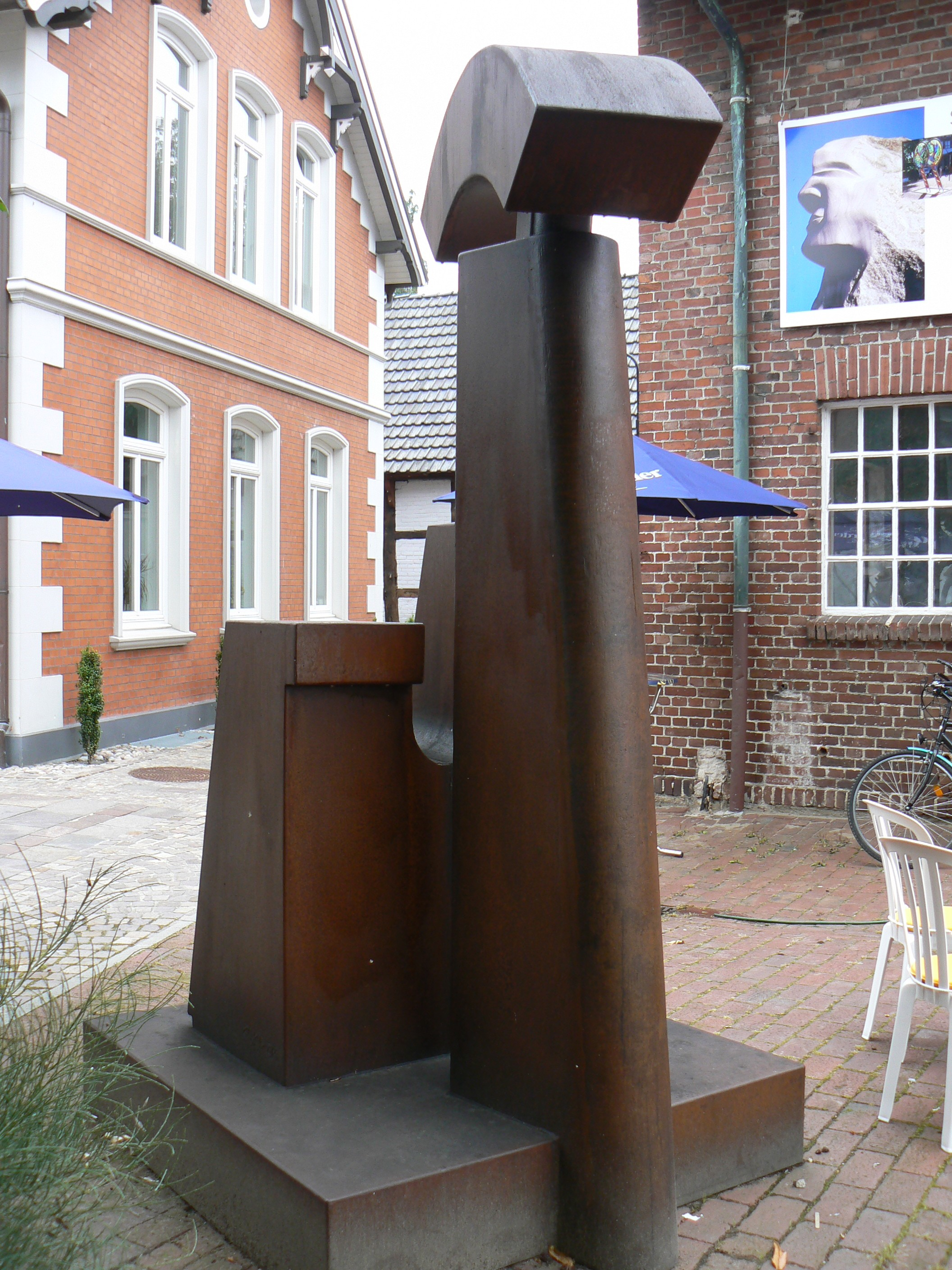 Sculpture by Klaus Duschat in Damme/Germany